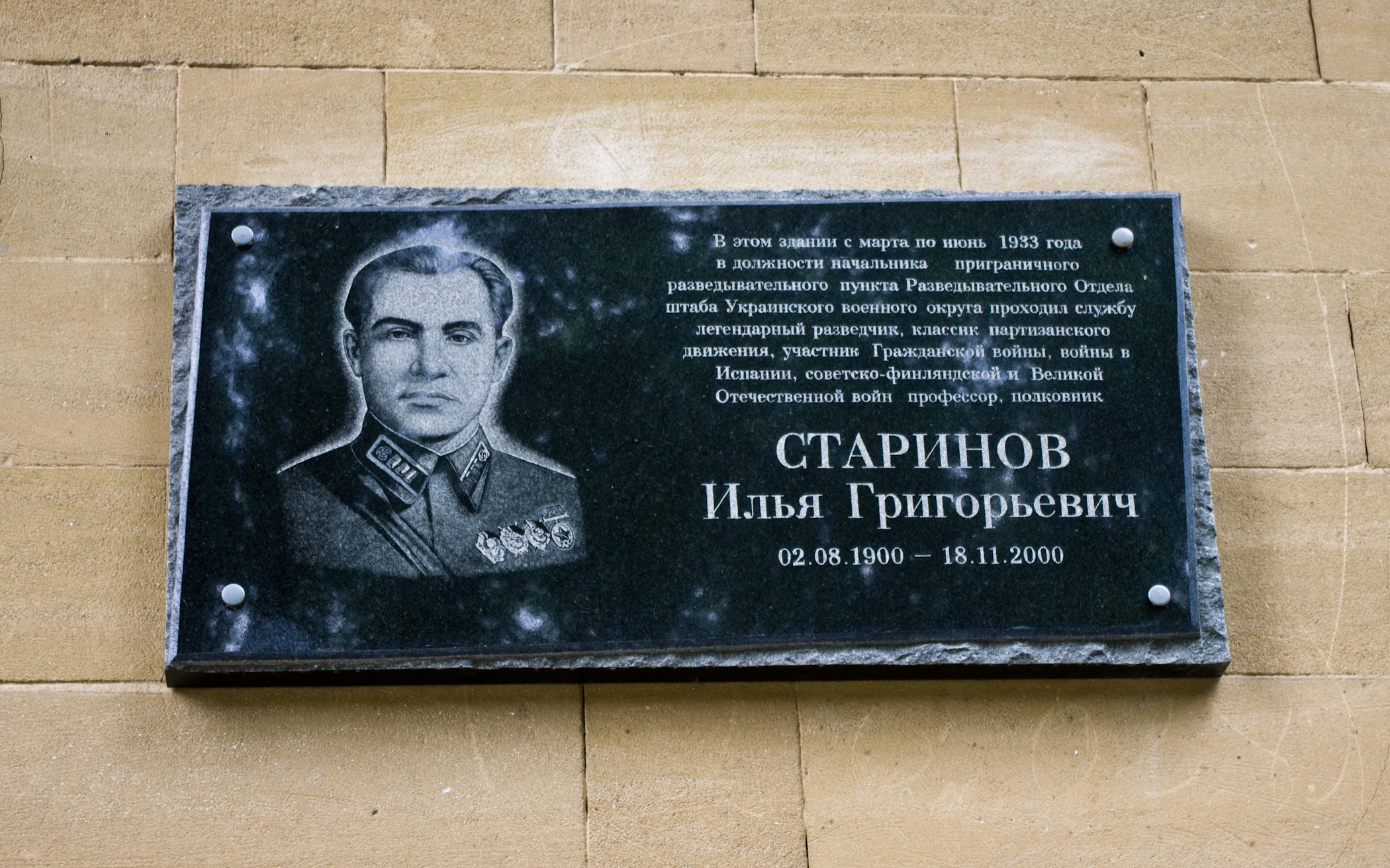 Памятная доска на здании Министерства здравоохранения и социальной защиты ПМР